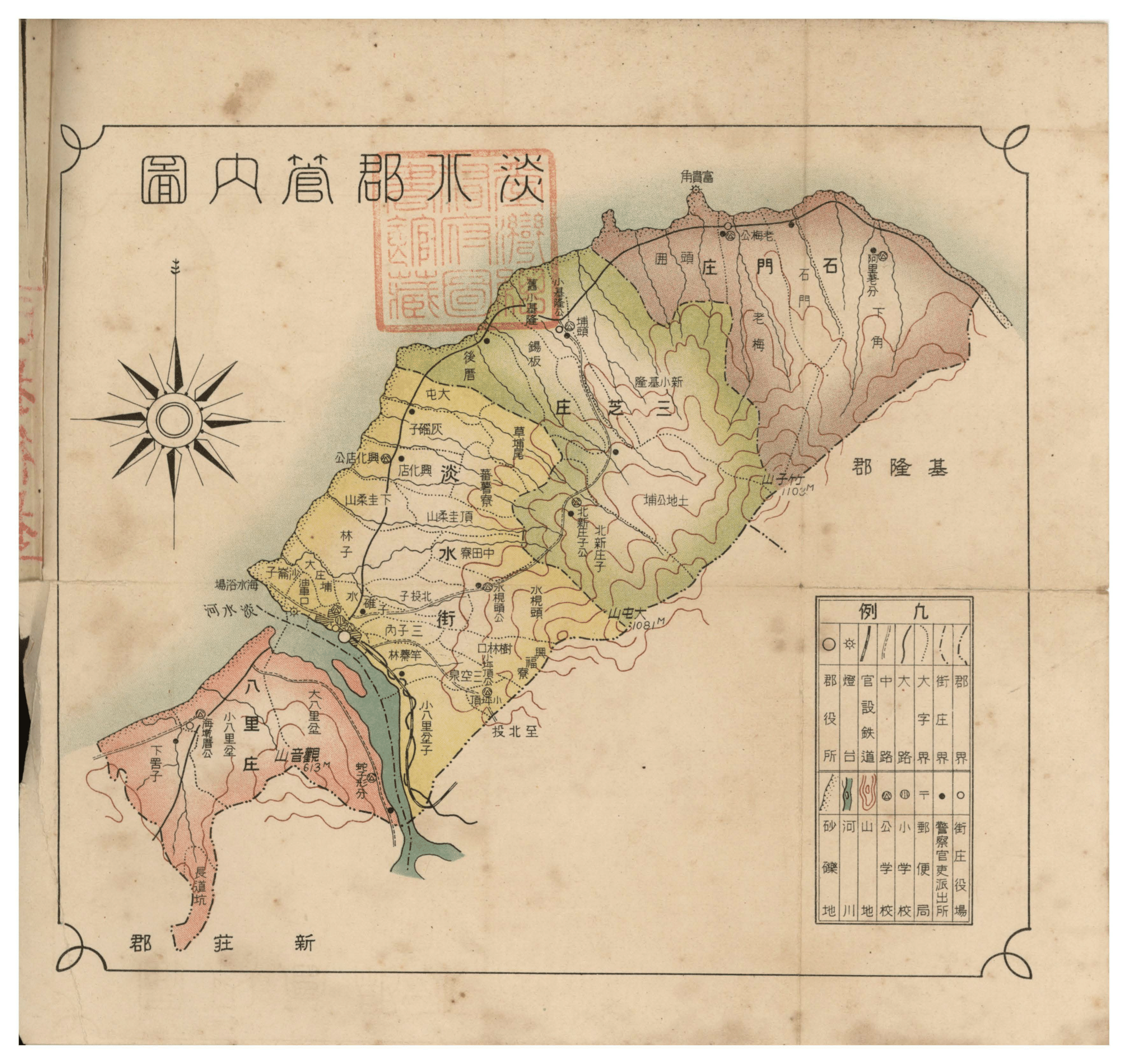 1930年淡水郡地圖